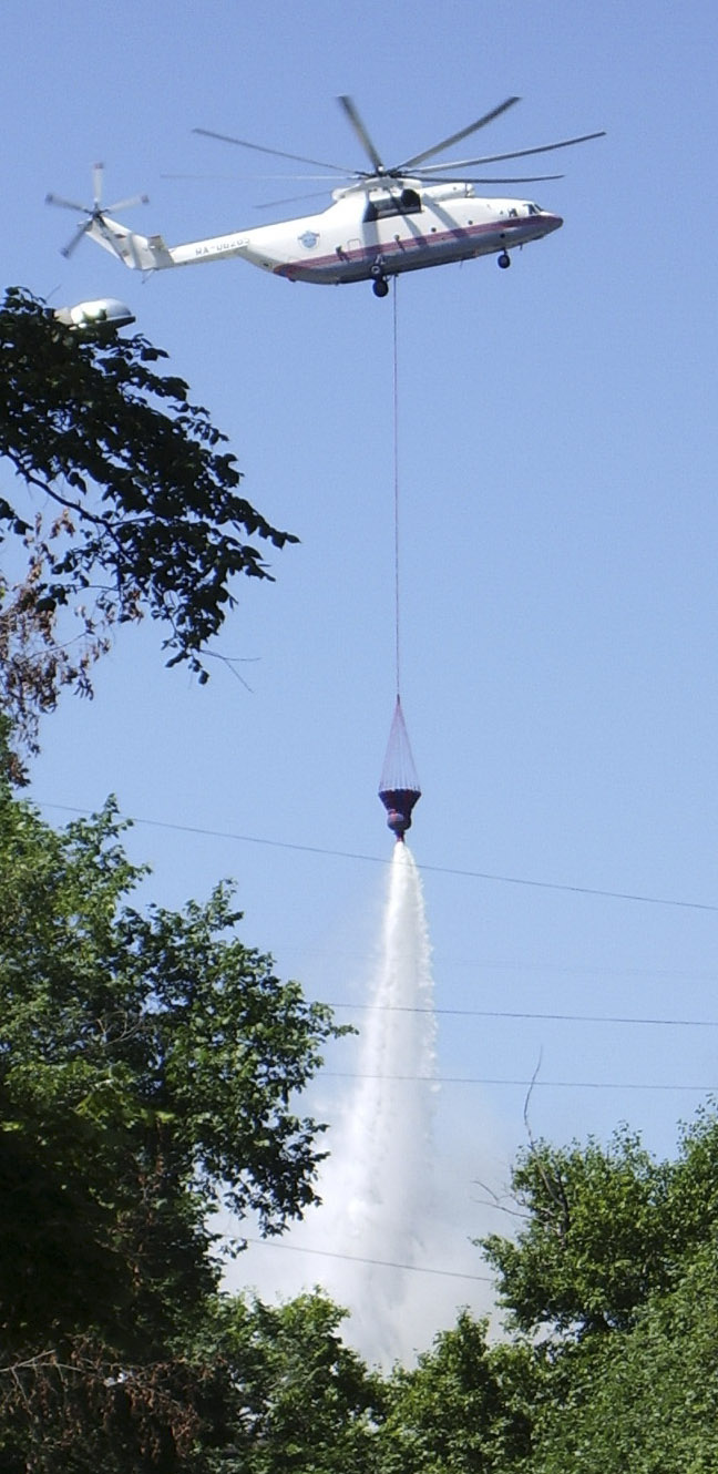 Ми-26 тушит пожар в одном из корпусов НПО Алмаз 30 июня 2010 года. Москва.